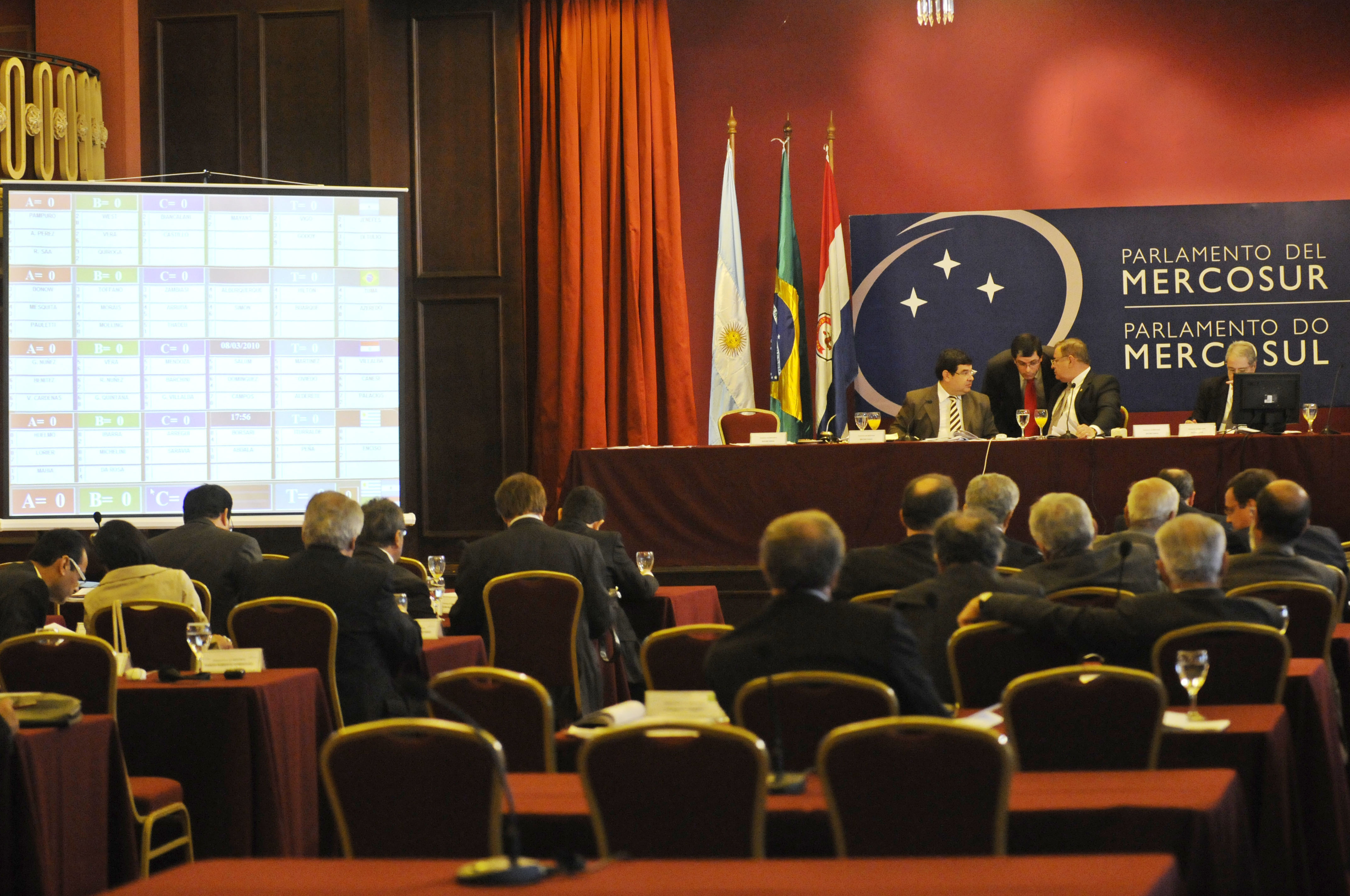 Sessão de votações do Parlamento do Mercosul, presidida pelo Parlamentar Paraguaio Ignacio Mendonza Unzain. Março de 2010 Foto: Leopoldo Silva